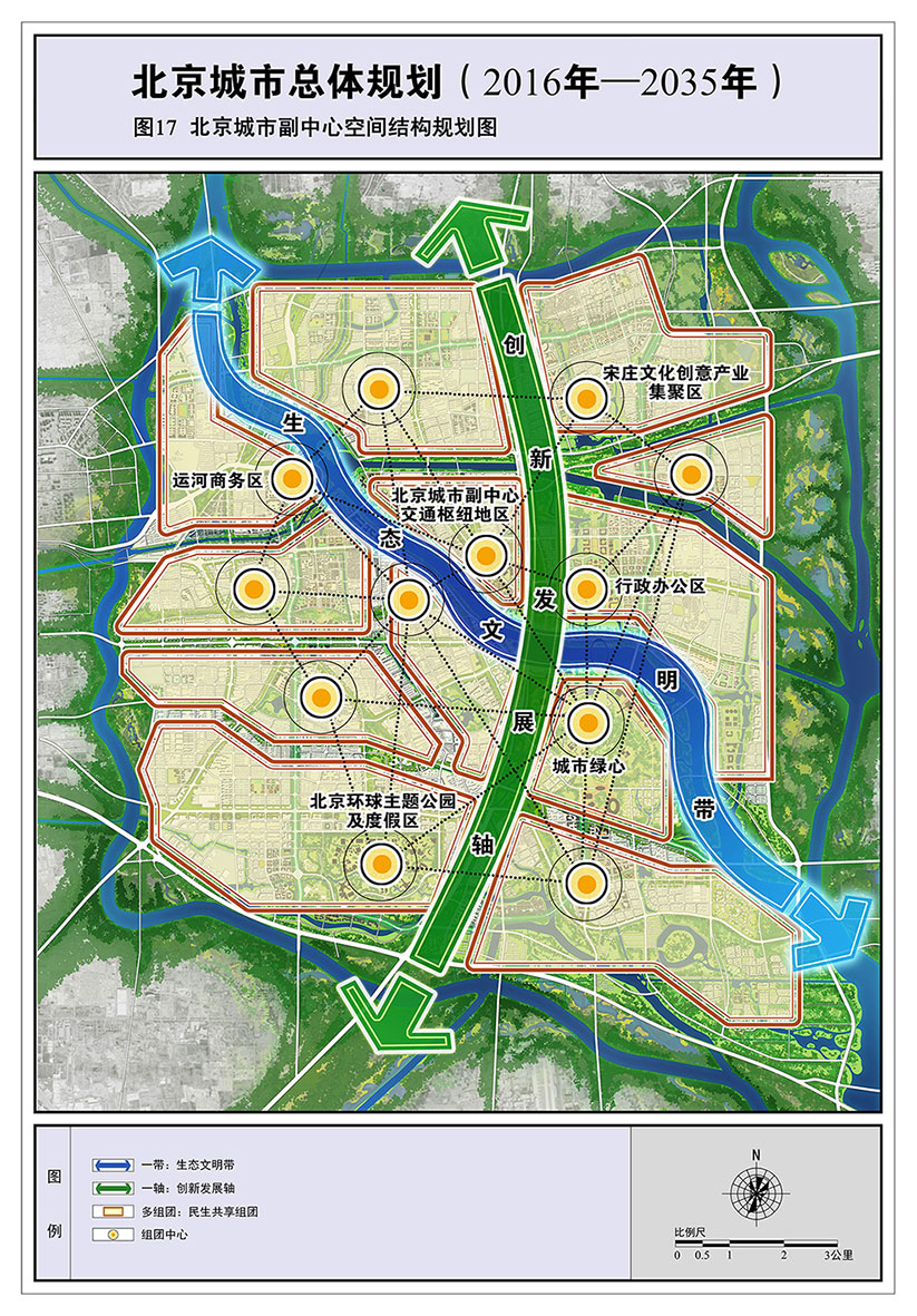 中文（中国大陆）: 北京城市总体规划（2016年－2035年）图17 北京城市副中心空间结构规划图